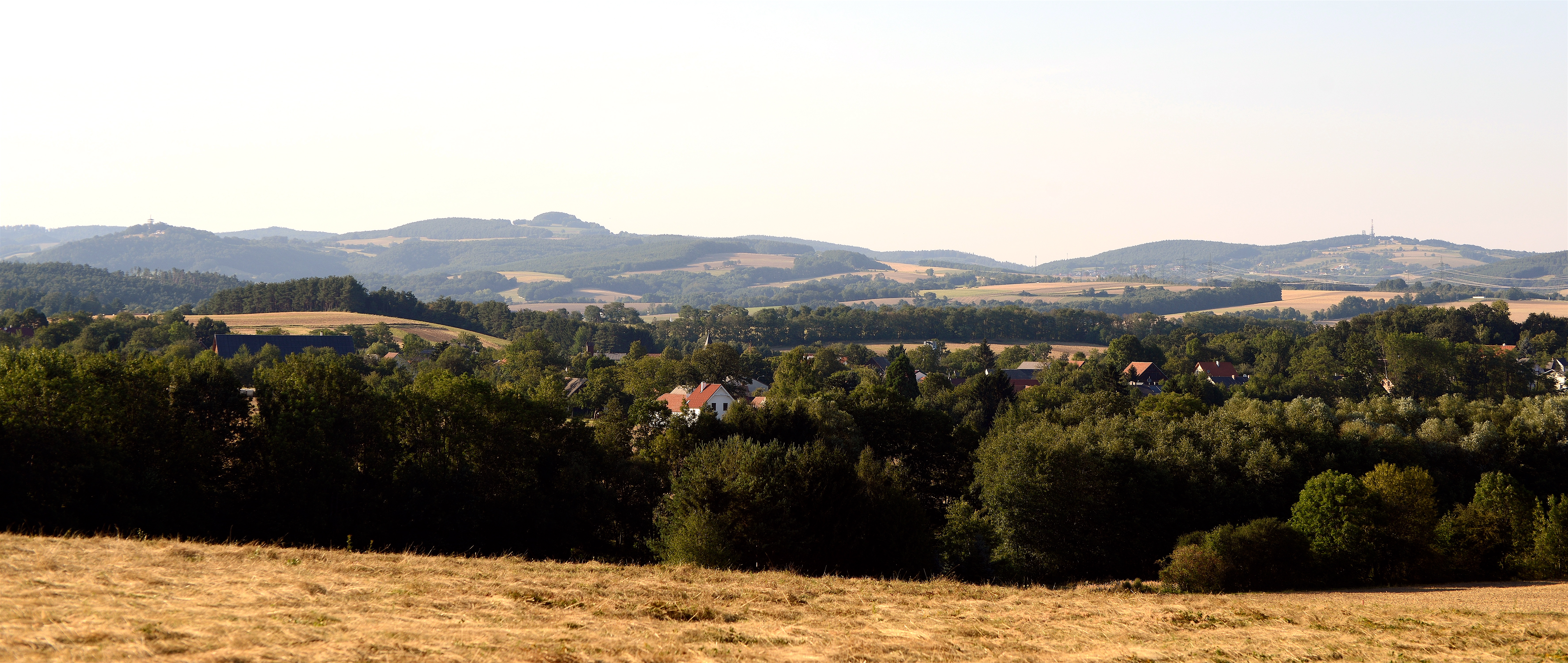 Anhöhe von links nach rechts: Schwarzenbacher Burgberg mit dem Aussichtsturm, Sieggrabener Kogel, Sieggrabener Sattel, Brenntenriegel mit dem Mobilfunk- und Richtfunksender. Kamerastandpunkt: Waldstück zwischen Lindgraben und Neudorf.